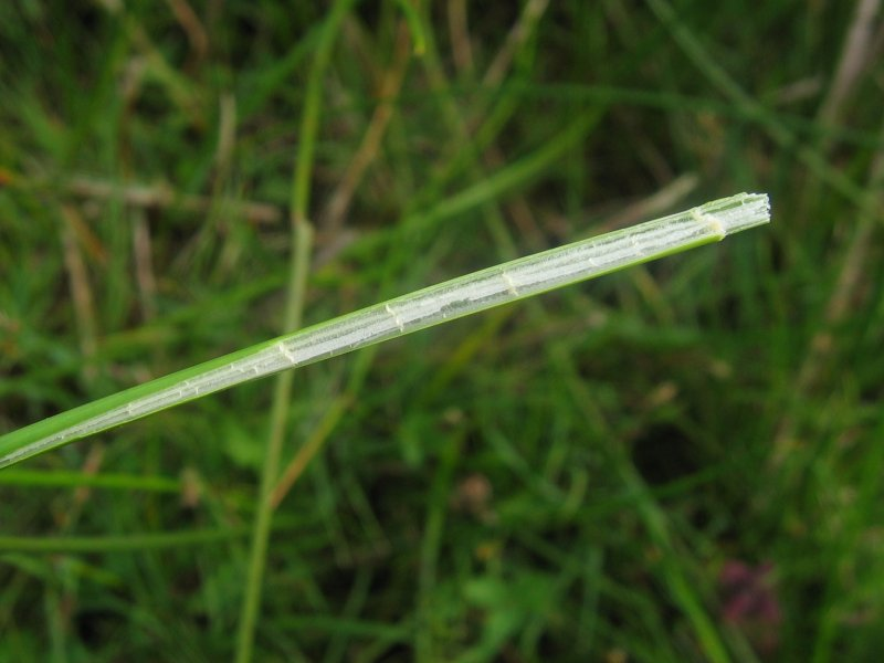 gekammertes Mark der Stumpfblütigen Binse Juncus subnodulosus, Warnow-Wiesen bei Rostock